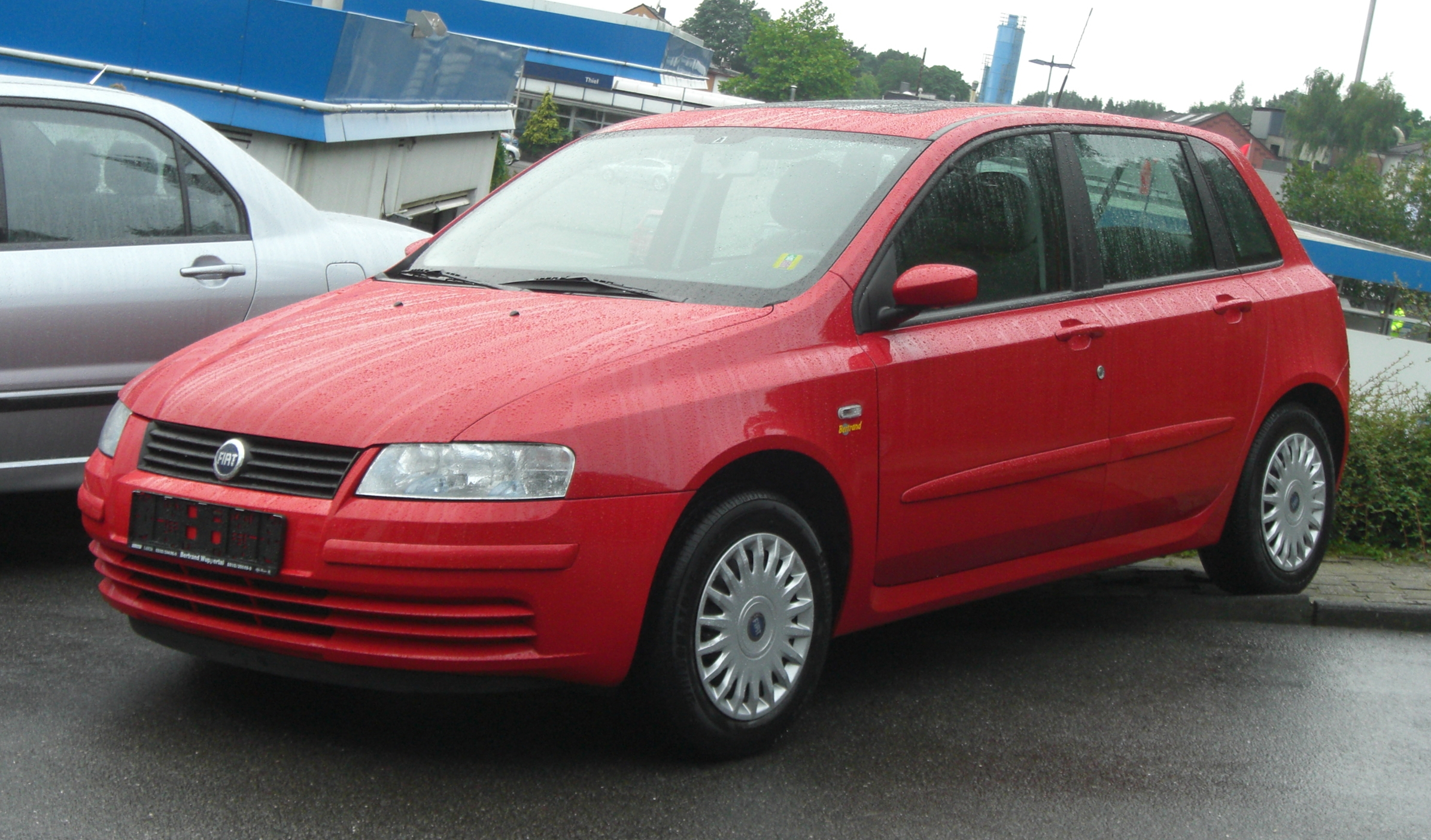 Fiat Stilo